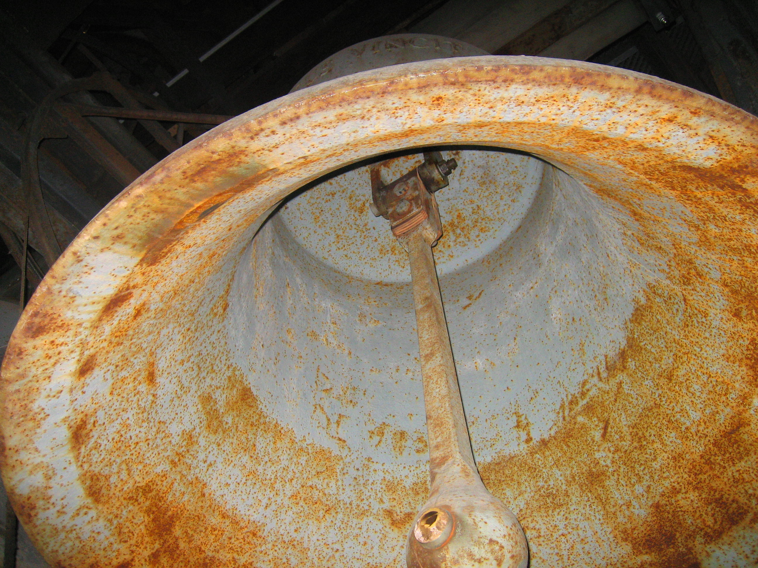 Christuskirche Heidelberg, Vaterunserglocke